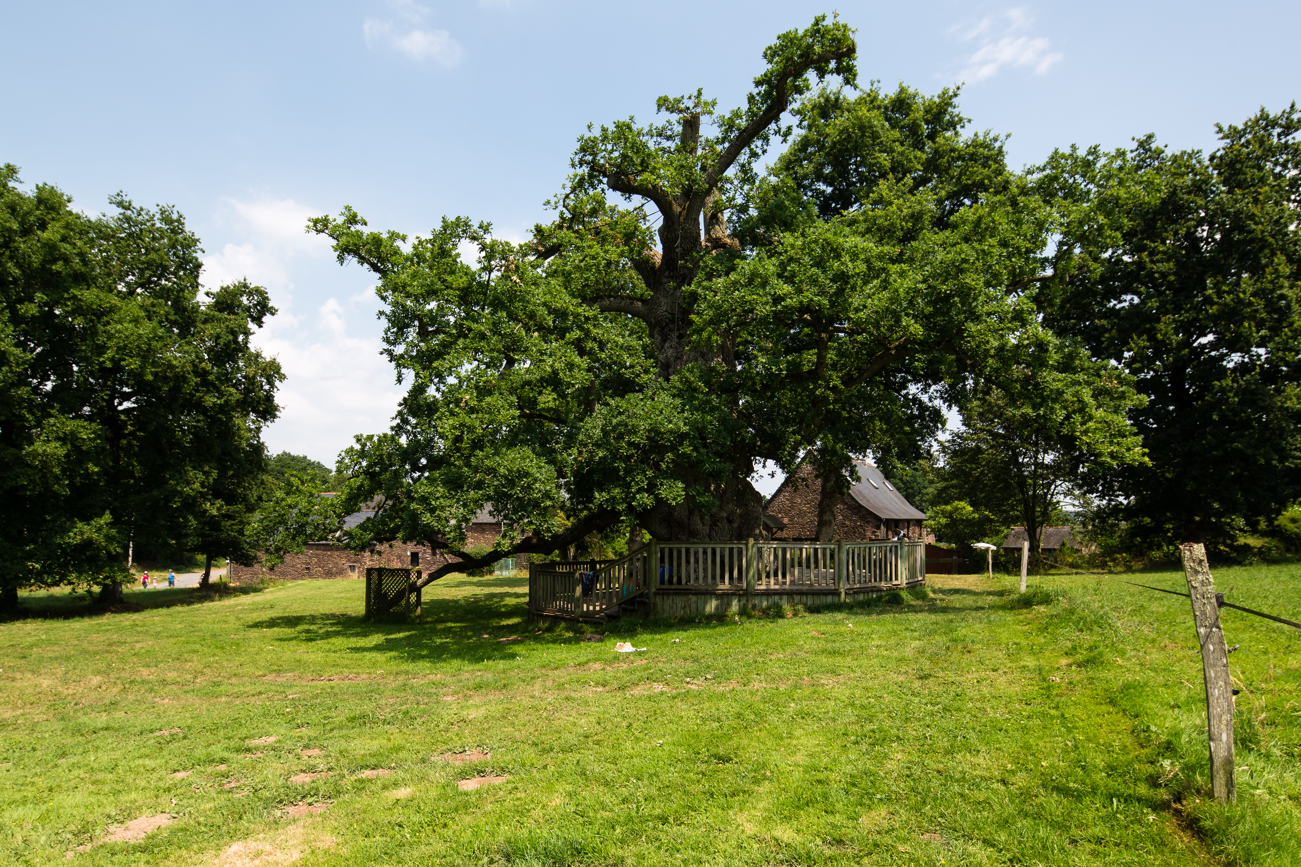 Le chêne à Guillotin de Concoret (France) en été.